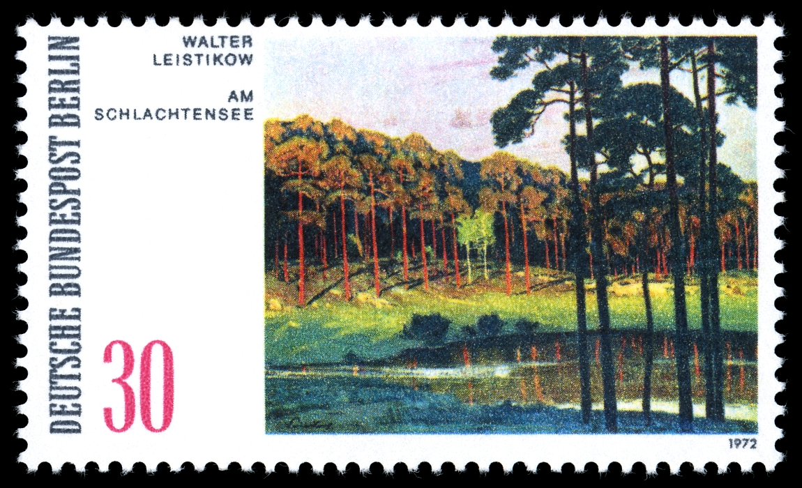 German stamp, showing Am Schlachtensee, by Walter Leistikow (1865–1908) Alternative names Falter Leistikow; w. leistikow; leistikow; Leistikow Walter; Walther Leistikow; W. von Leistikow; walther leistikowDescriptionGerman painter and writerDate of birth/death 25 October 1865 24 July 1908Location of birth/death Bromberg